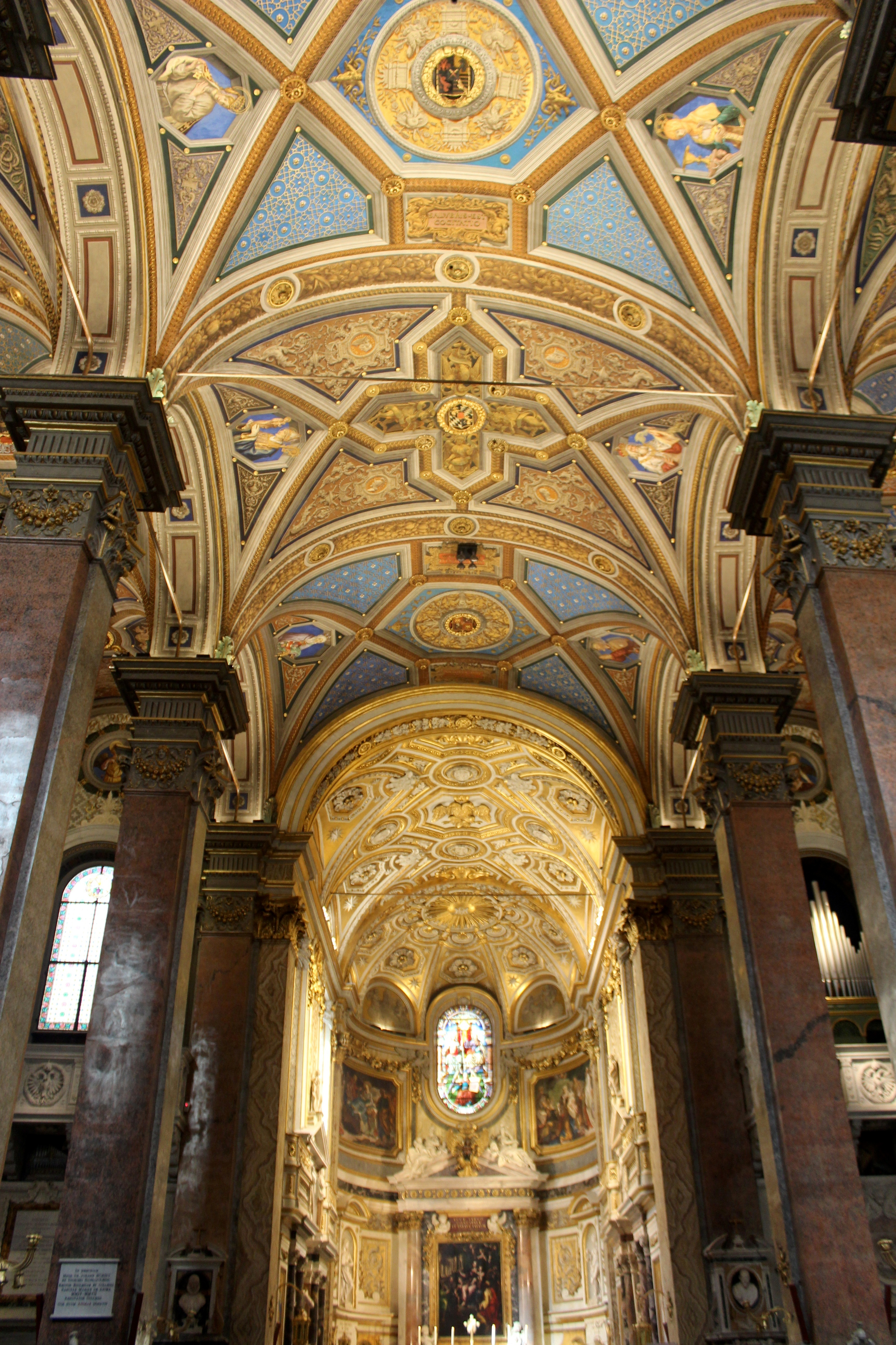 Roma. Santa Maria dell'Anima. Interior.